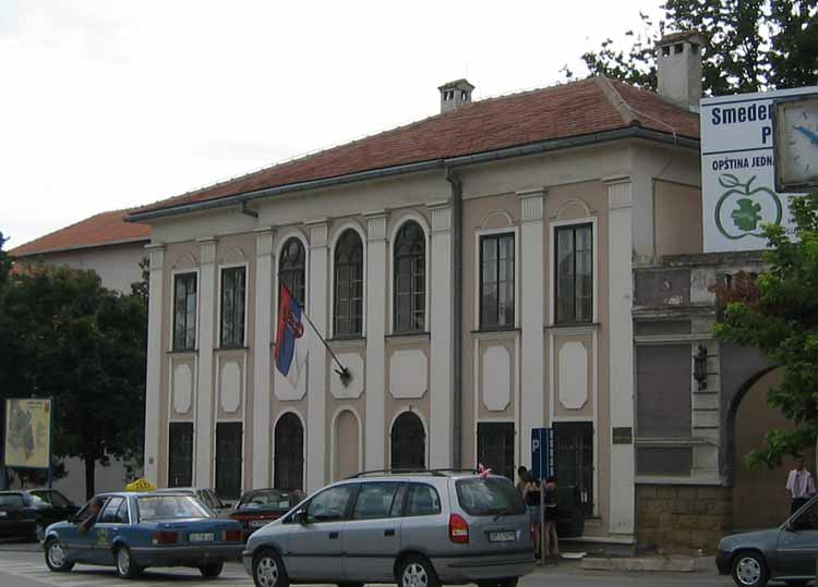 Народни музеј у Смедеревској Паланци